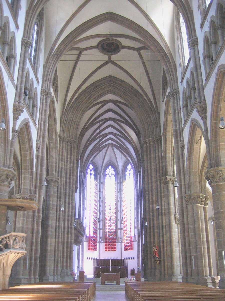 St. Paul in München, Innenraum